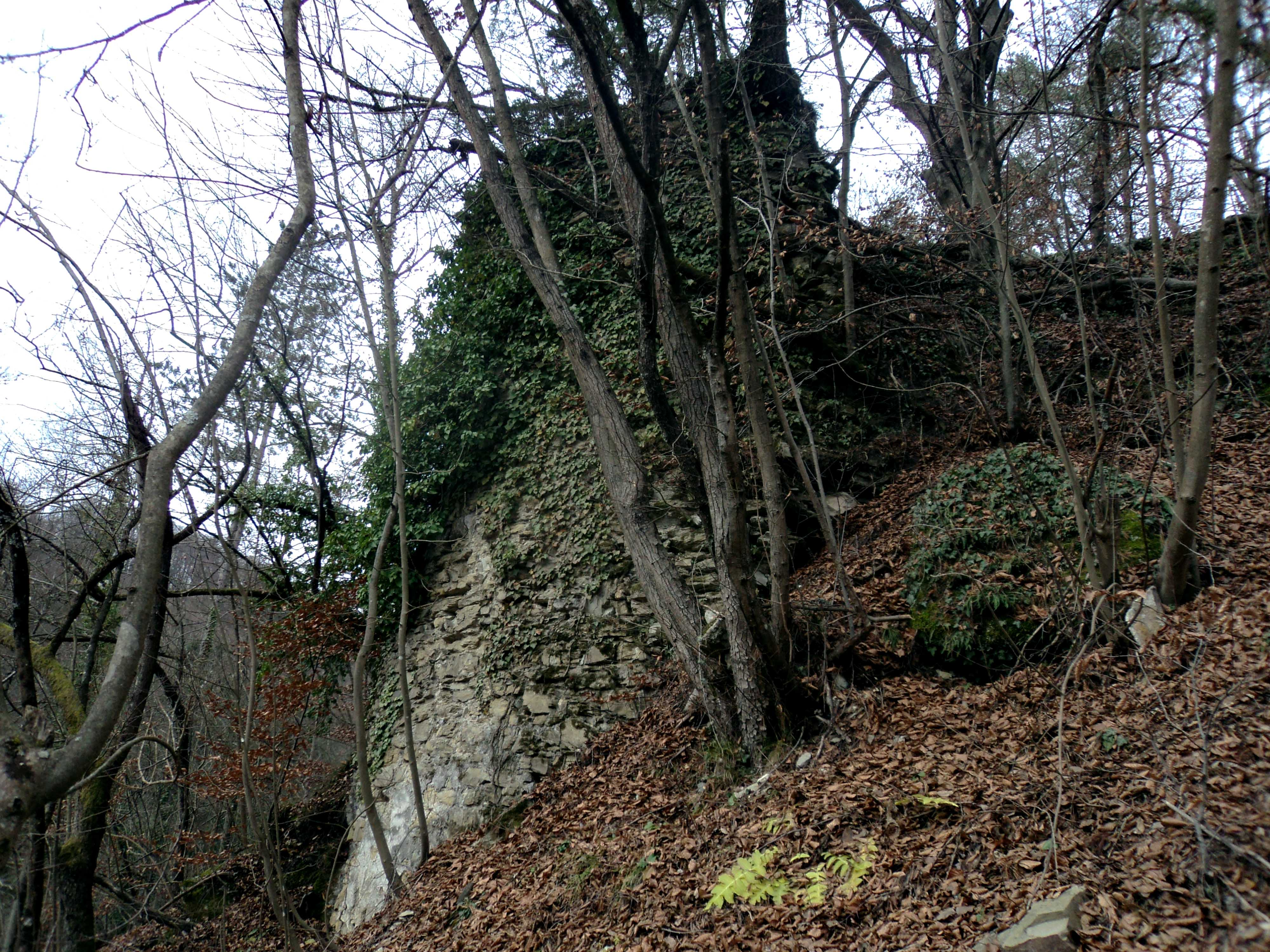 Ruševina gradu Boštanj leta 2012